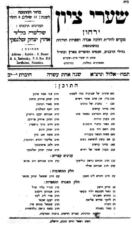 שער גליון שערי ציון